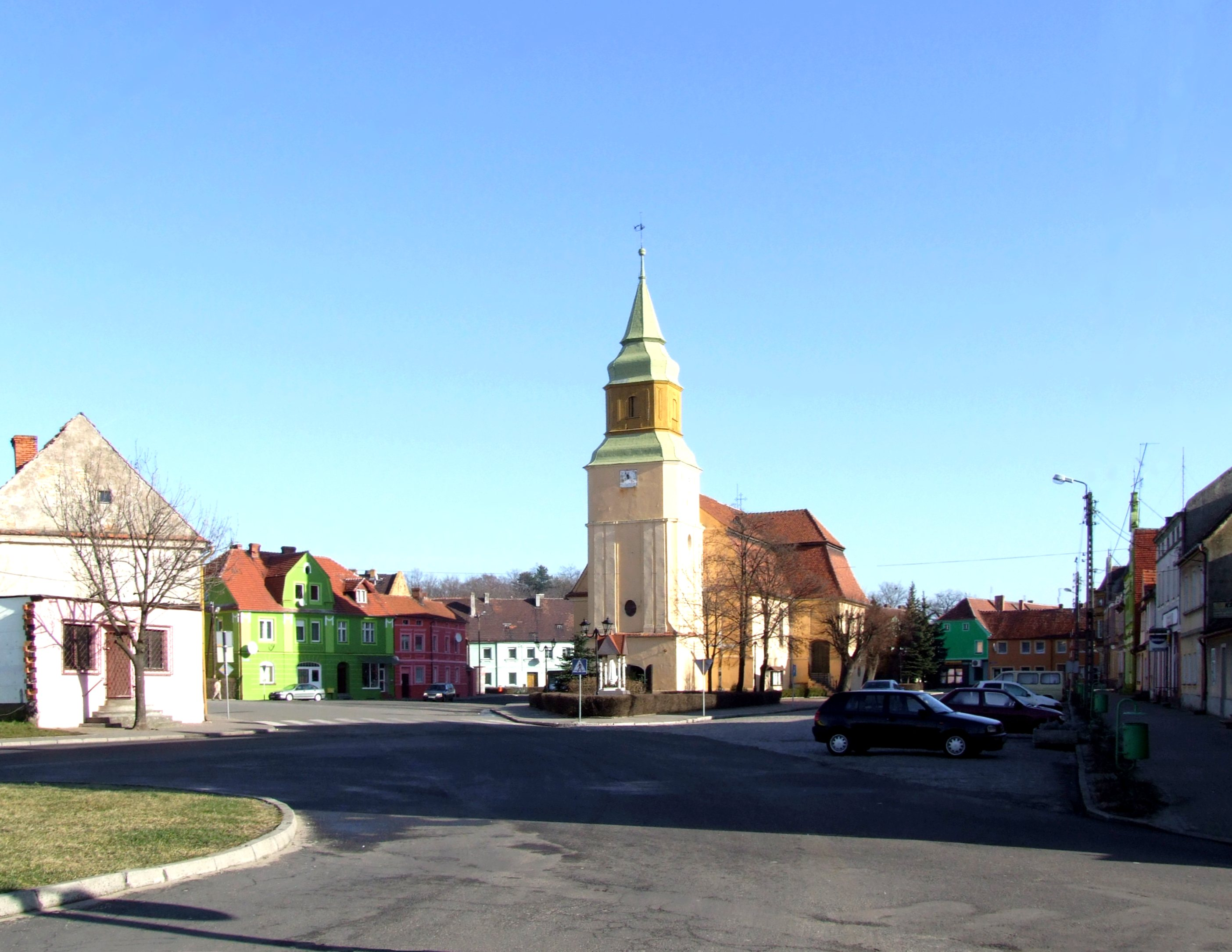 Rynek w Jasieniu